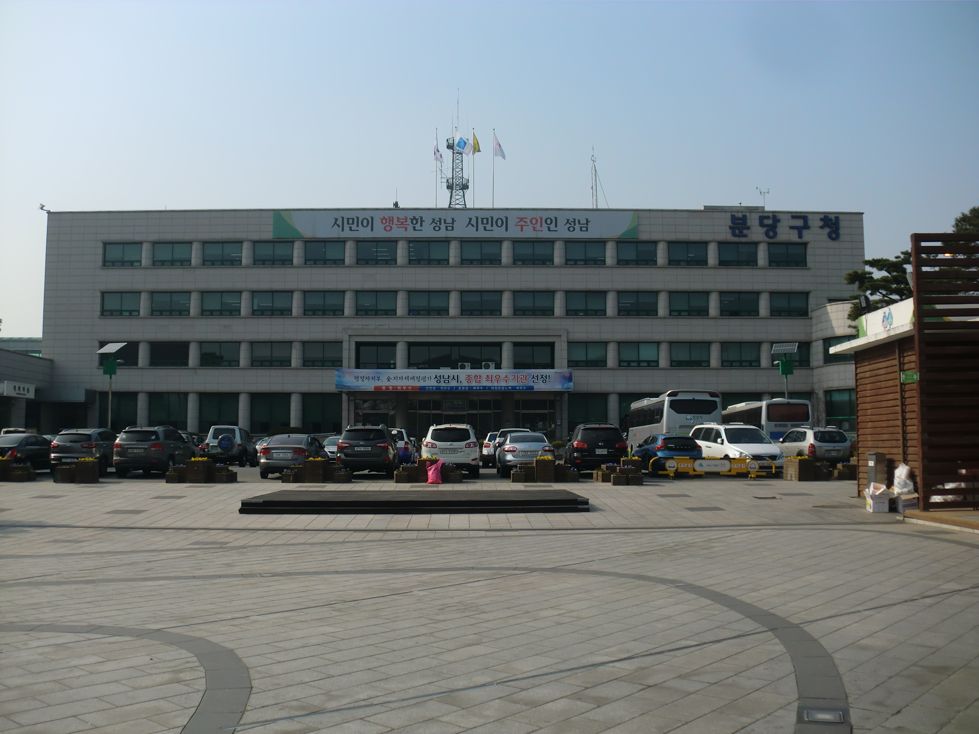 경기도 성남시에 있는 분당구청